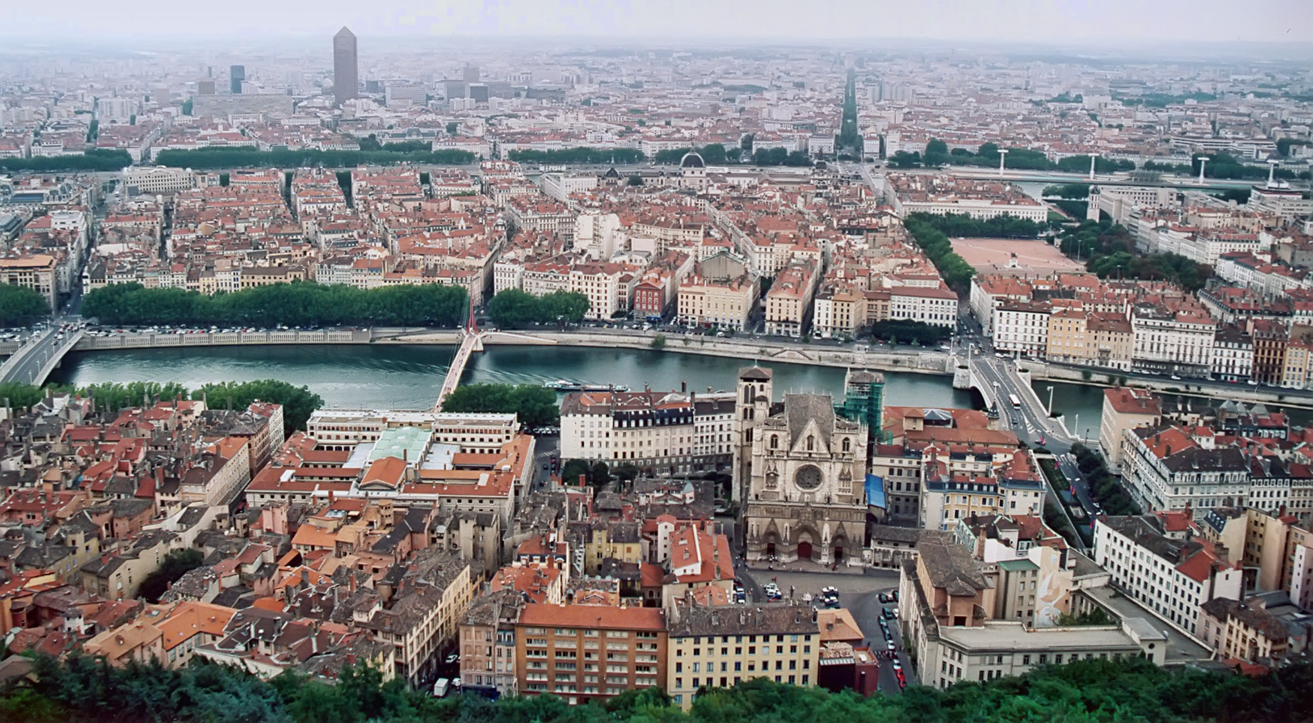 Lyon Vue depuis Fourvière Auteur : GIRAUD Patrick Licensing Catégorie:Image de Lyon